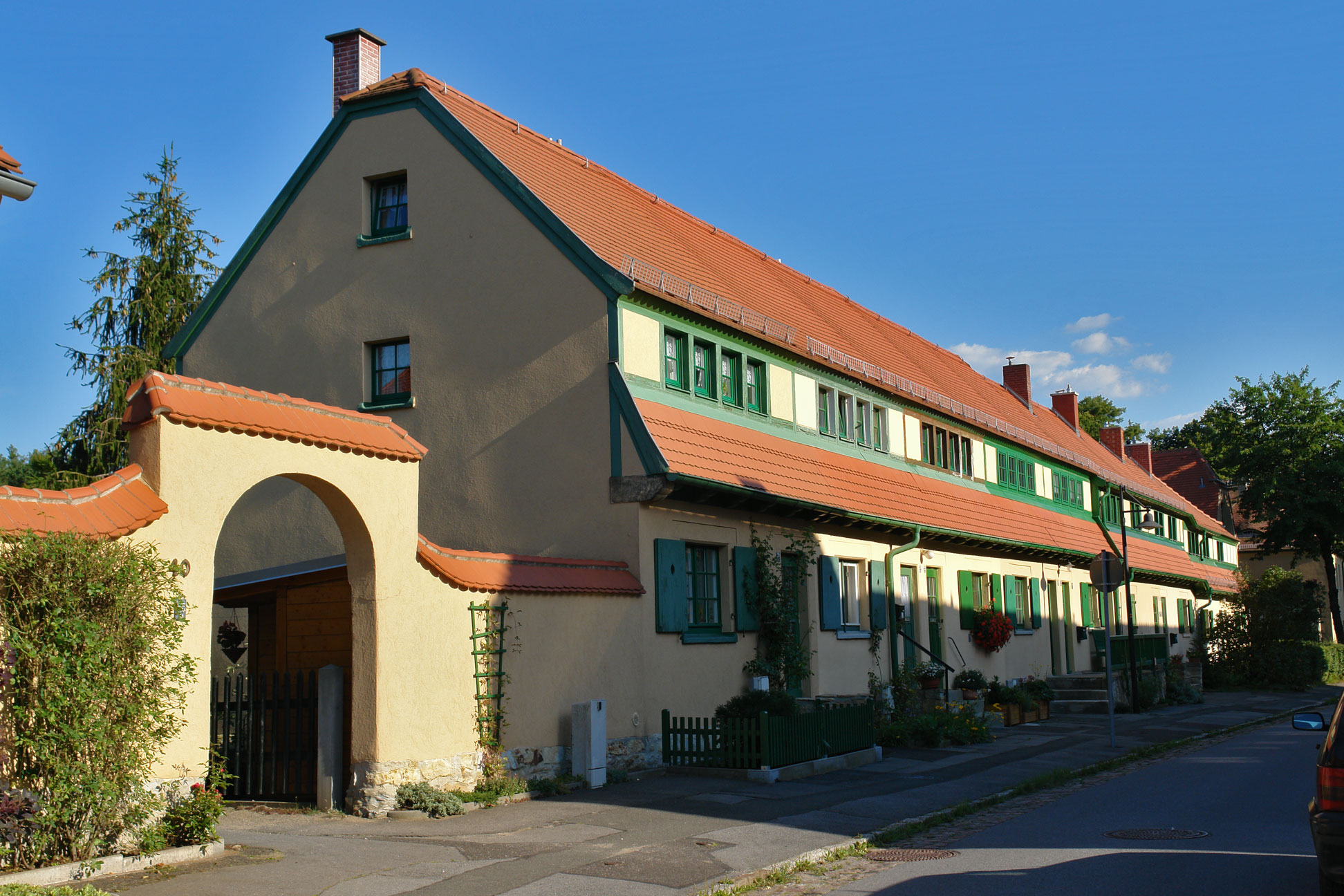 Typische Häuserreihe der Gartenstadt Dresden-Hellerau; "Am grünen Zipfel" Nr.26-24-22-20-18-16-14-12-10